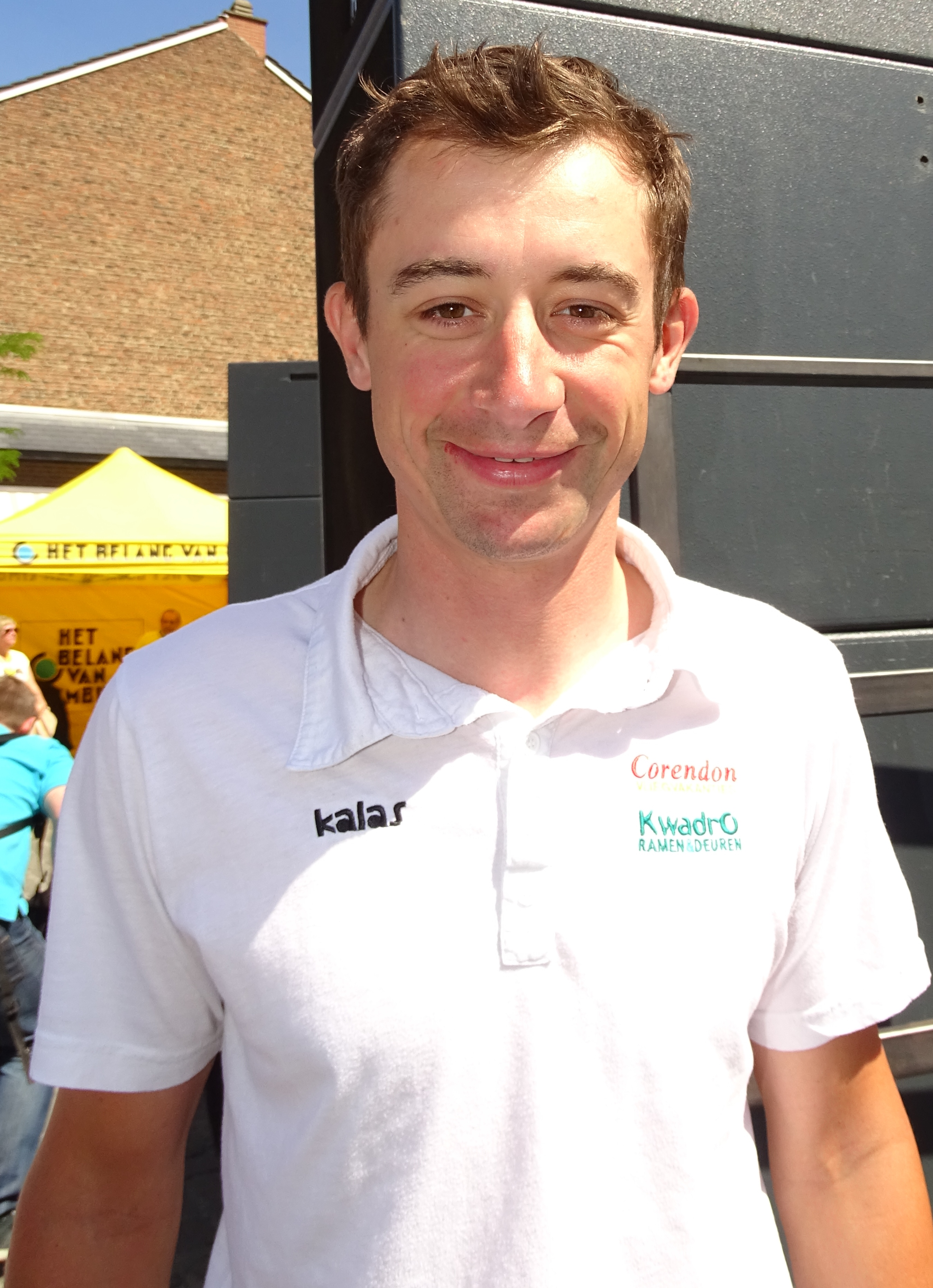 Reportage réalisé le dimanche 14 juin à l'occasion du départ et de l'arrivée du Tour du Limbourg 2015 à Tongres, Belgique.